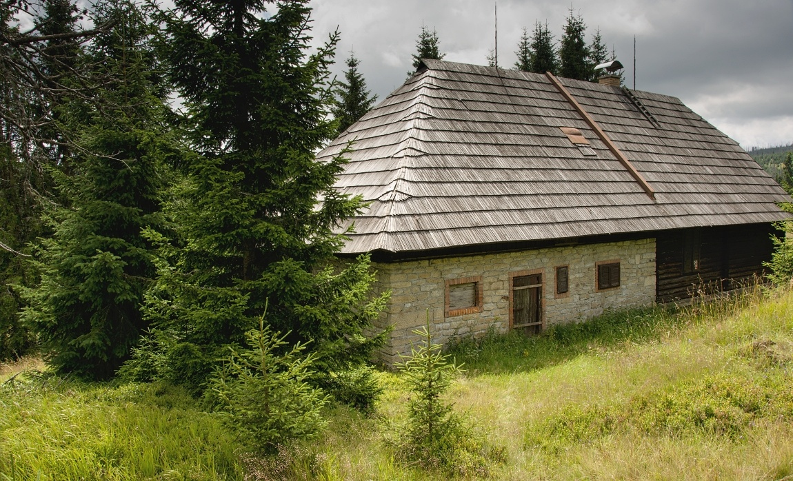 Roklanská chata 30.7.2017